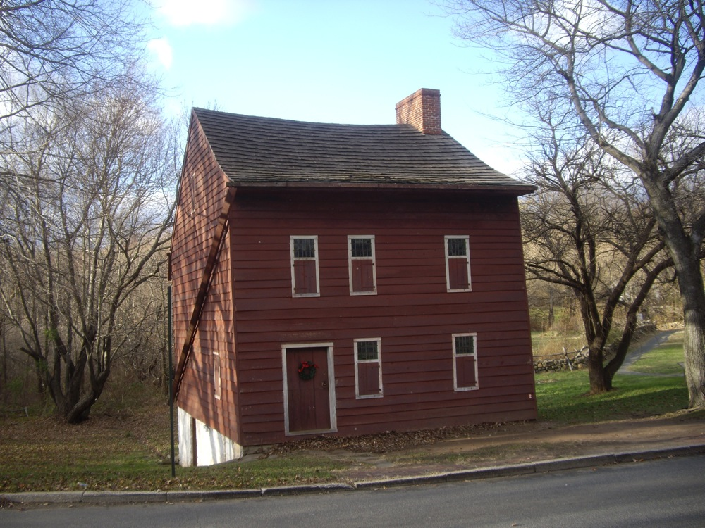 Voorlezer's House, Staten Island, NY